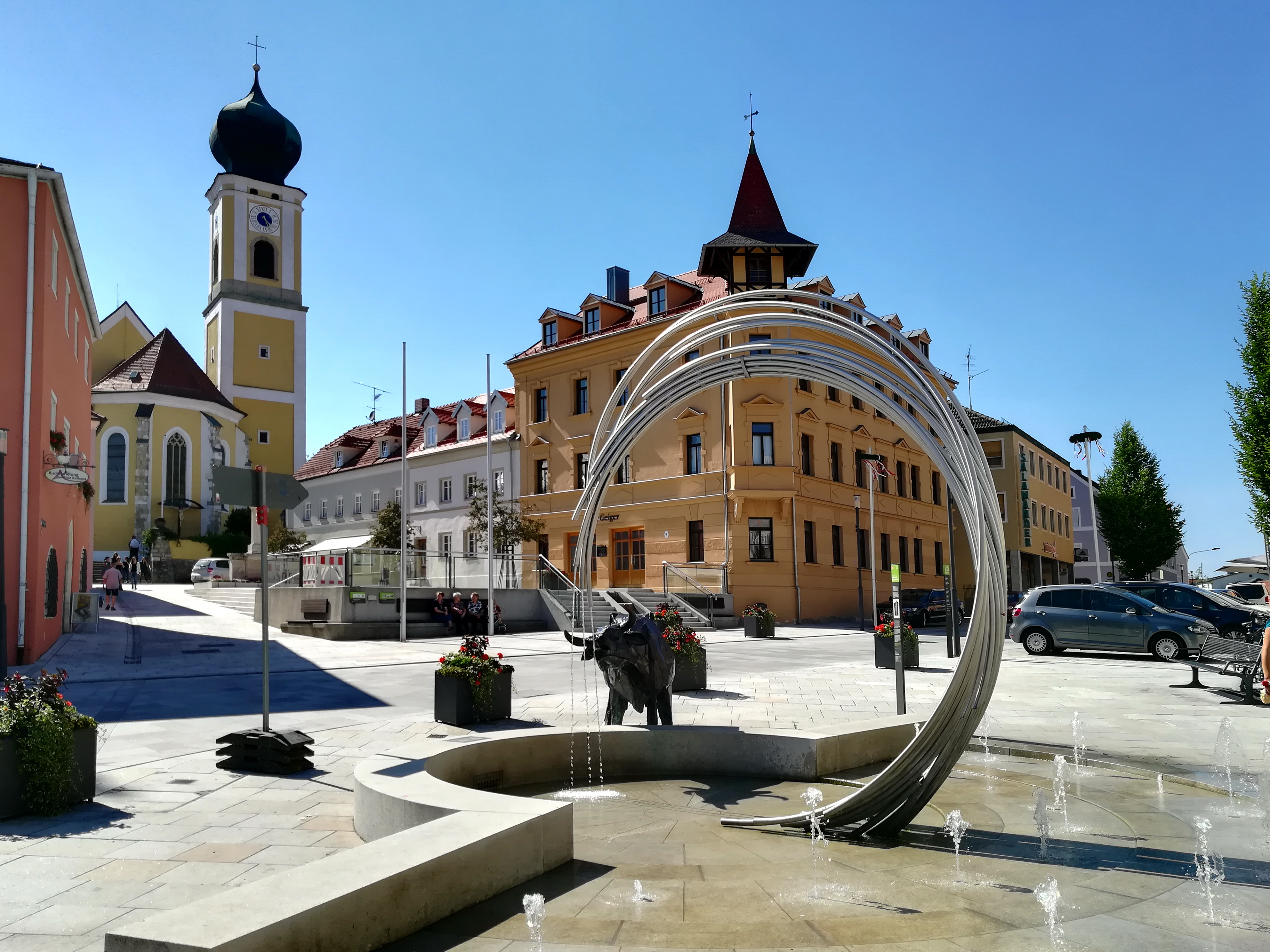 Hemau ist eine Stadt im Oberpfälzer Landkreis Regensburg in Bayern.